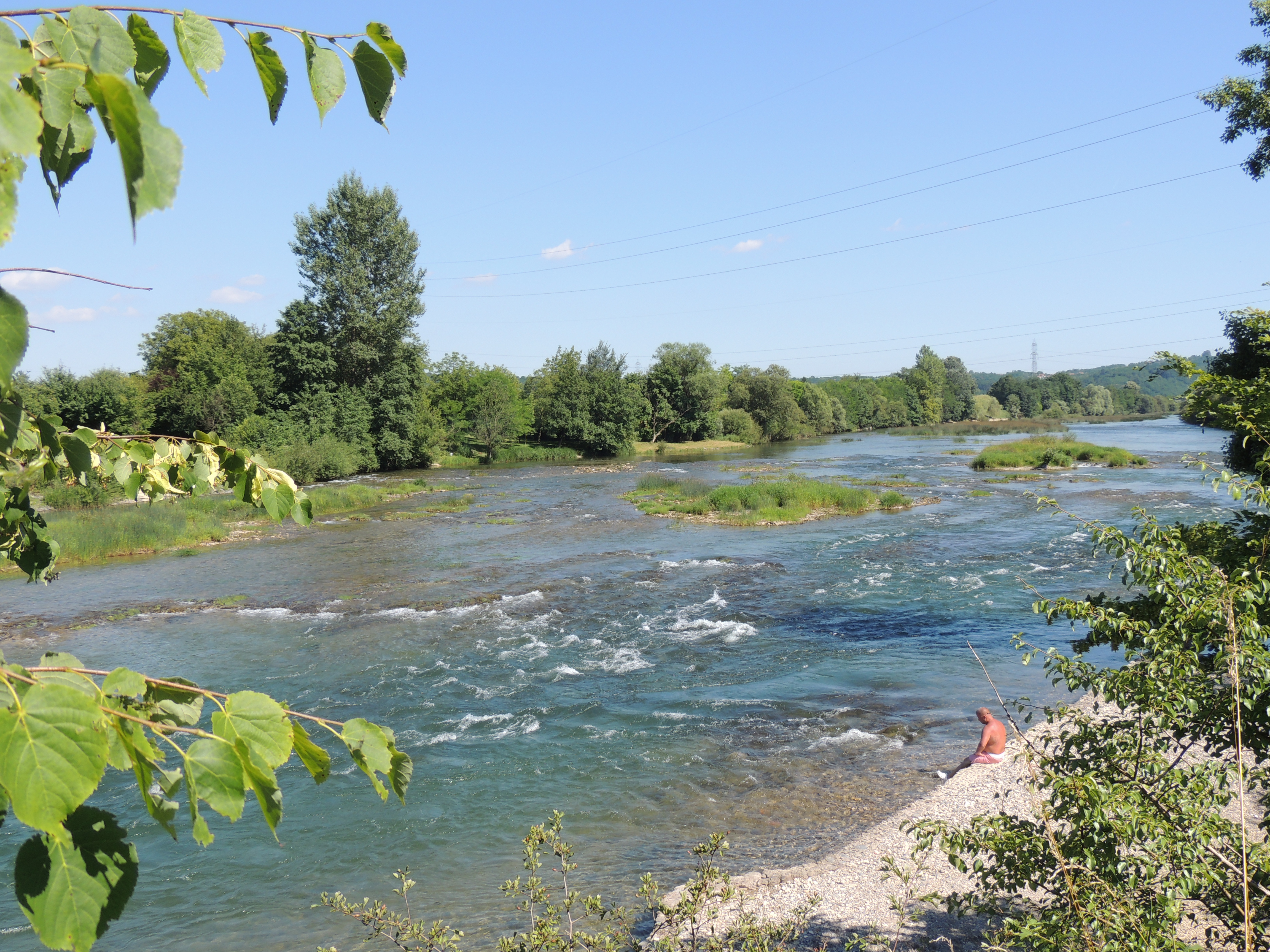 PRIZOR SA SANE . I okom se može "slušati" žubor primirenih brzaka, This image was uploaded as part of Trace of Soul 2018.